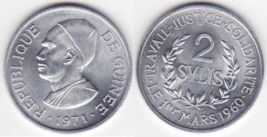 Moneda de dos Sylis.